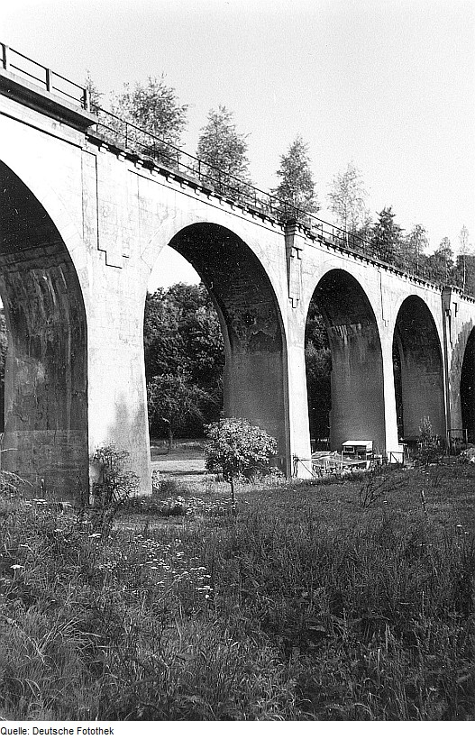 Original image description from the Deutsche FotothekHochkirch-Wuischke. Eisenbahnviadukt bei der Mühle, Technisches Denkmal [richtig: Weißenberg-Wuischke]